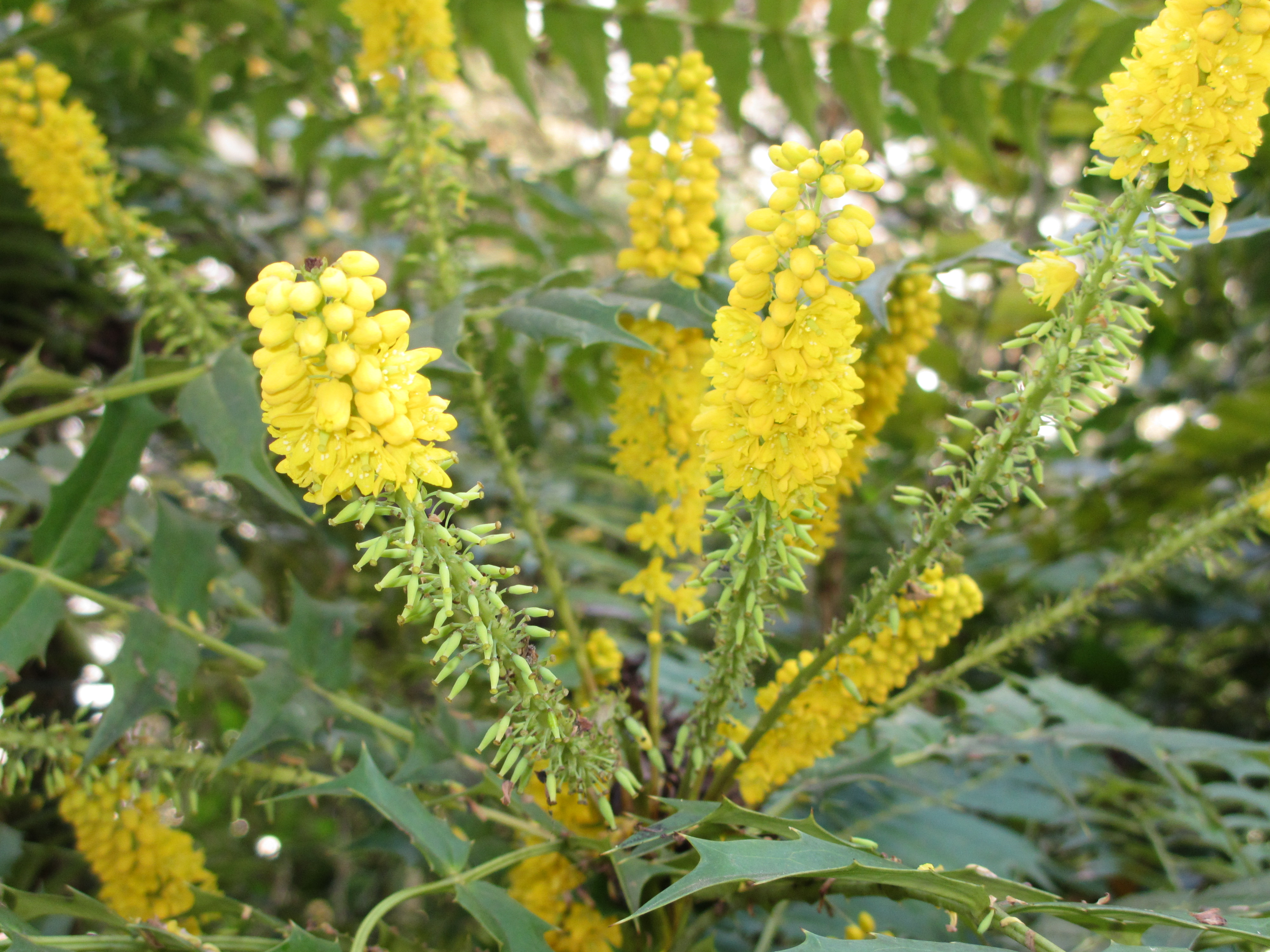 Parc de Saint Cloud, Mahonia X media en fleurs.